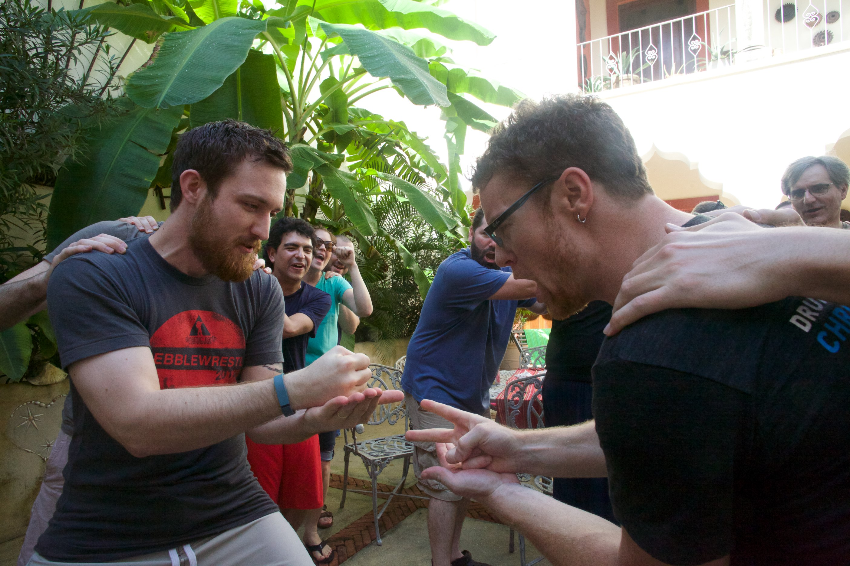 Соревнование по игре «камень, ножницы, бумага».